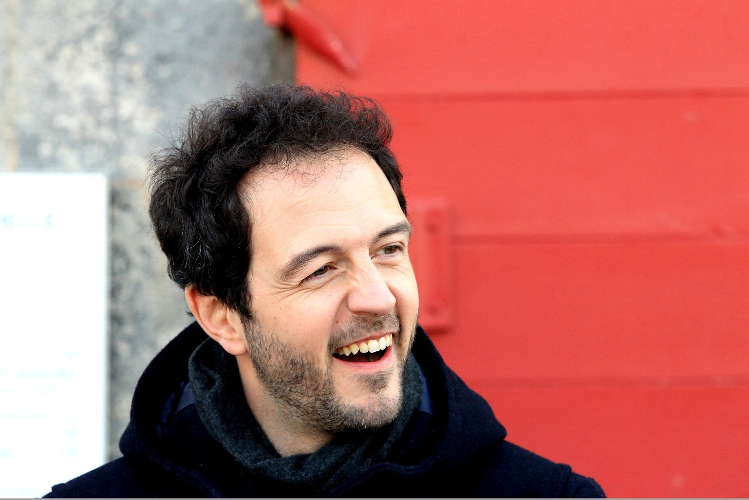 L' Acteur Guillaume Denaiffe sur le tournage de Meutres à La Rochelle en 2015